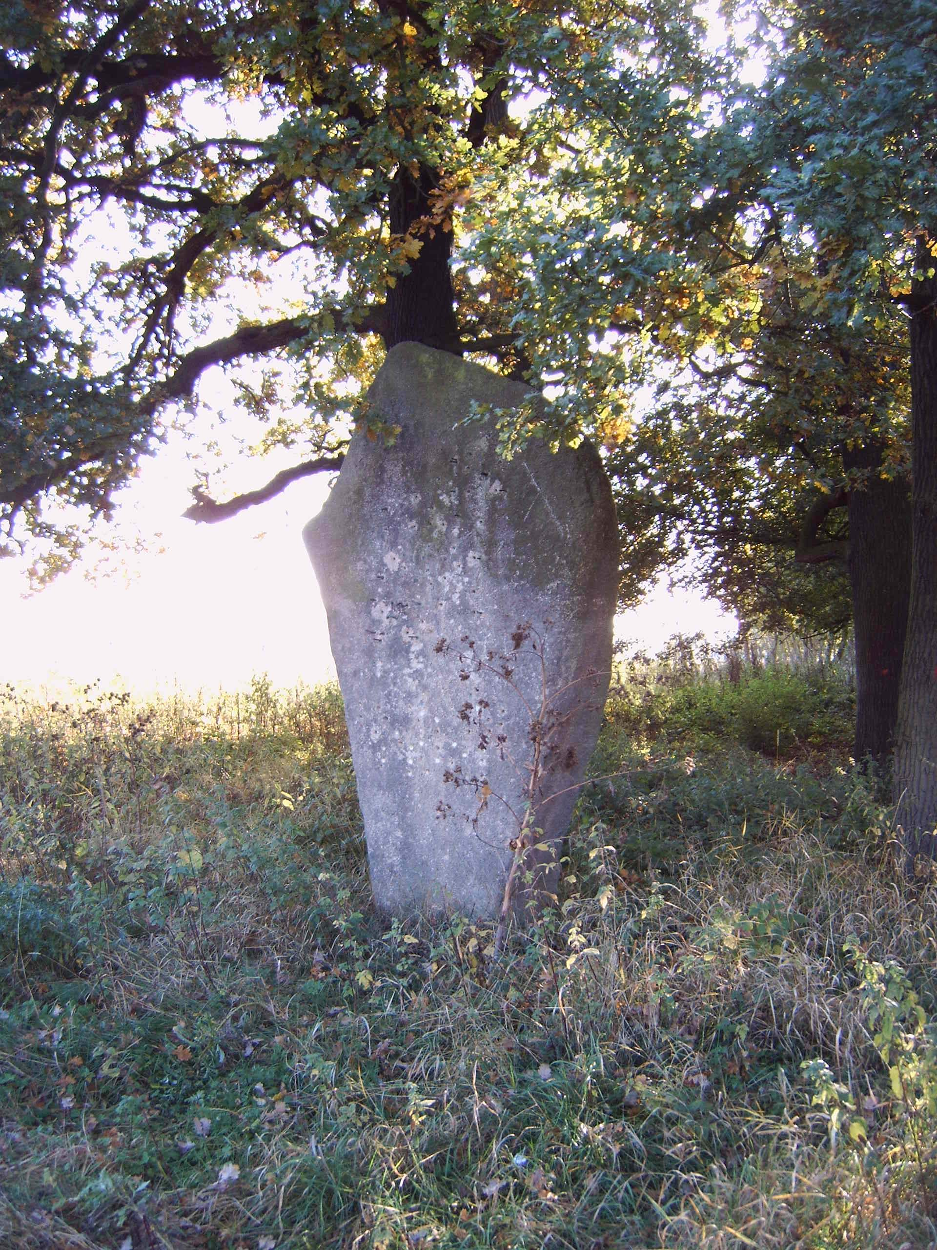 Gedenkstein Muttereiche, Biederitzer Busch, Magdeburg